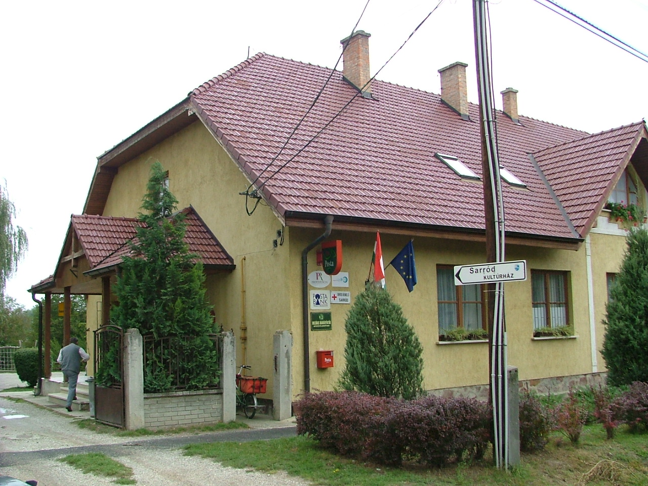 Sarródi kultúrház